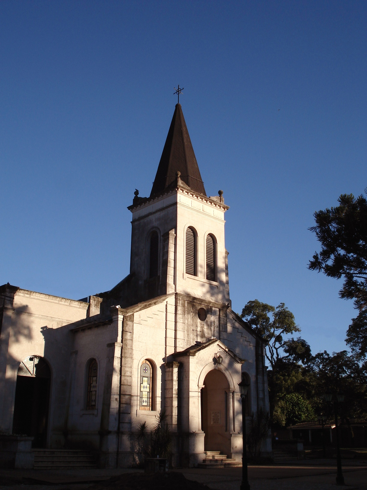 Iglesia, Yerba Buena, Tucumán